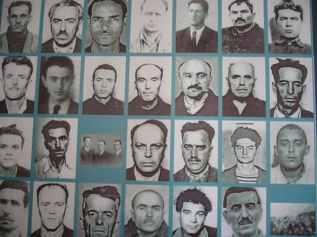 Foşti deţinuţi din închisoarea de la Sighetu Marmaţiei